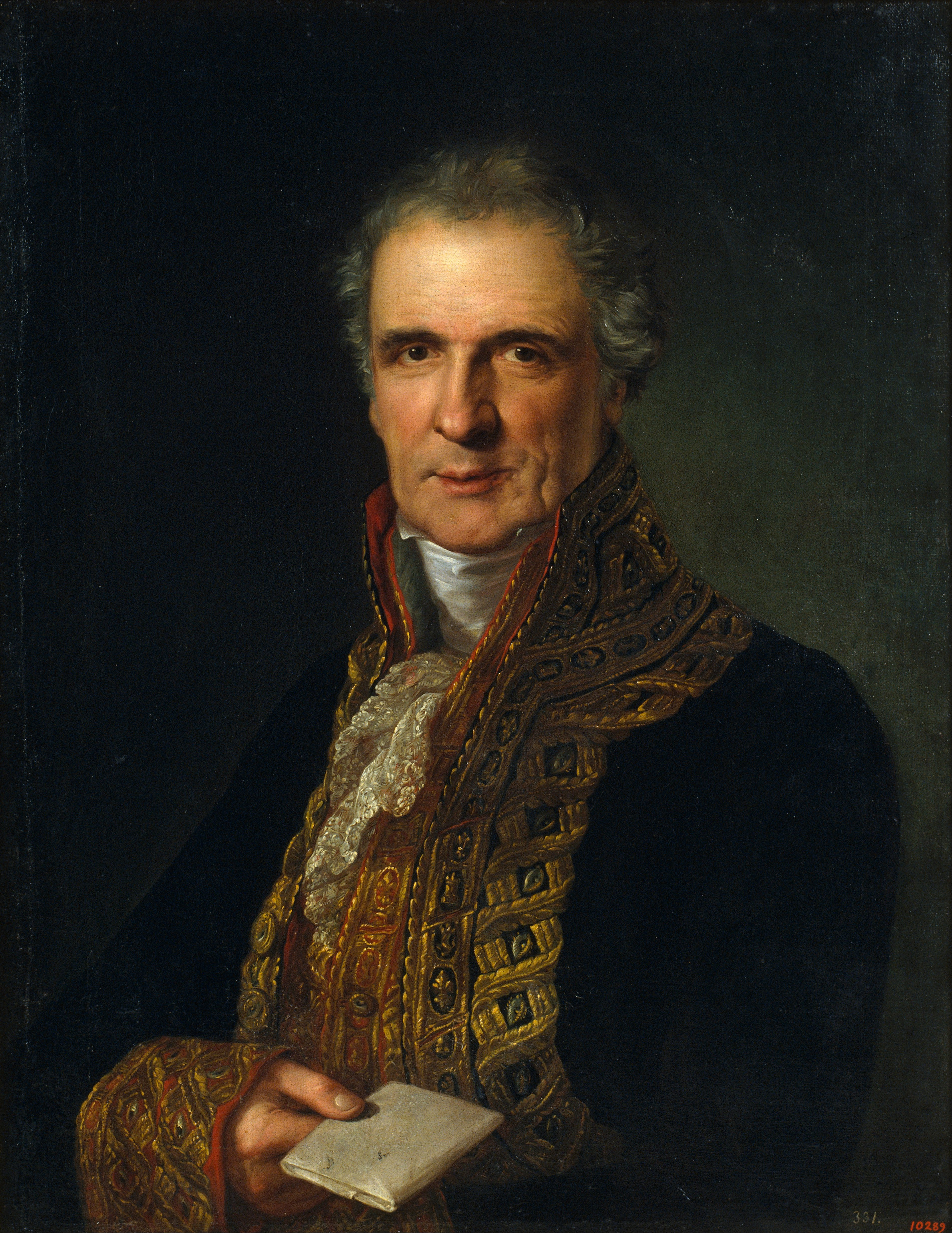 Retrato de don José María Díez de Aznar.